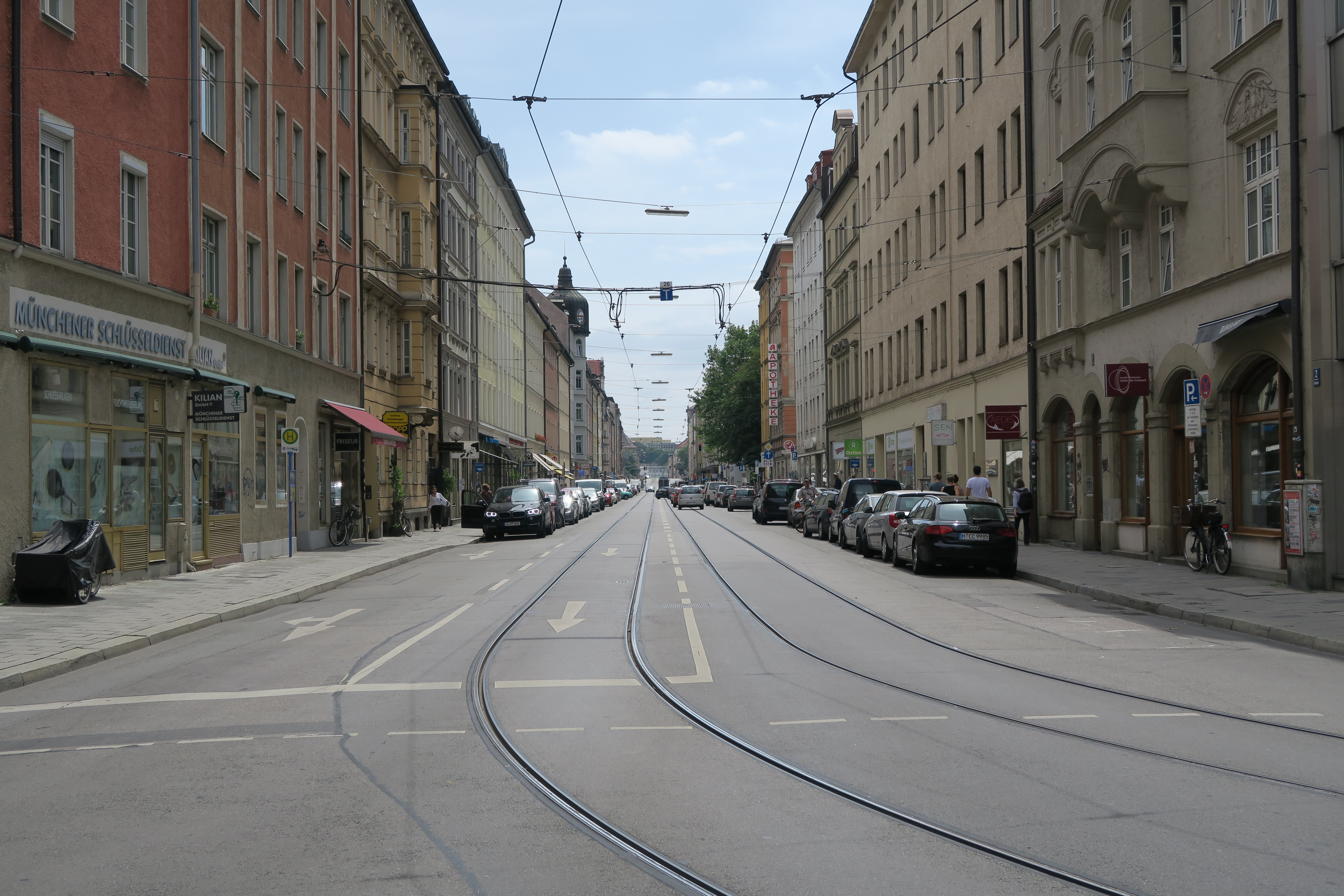 Blick in die Fraunhoferstraße in München